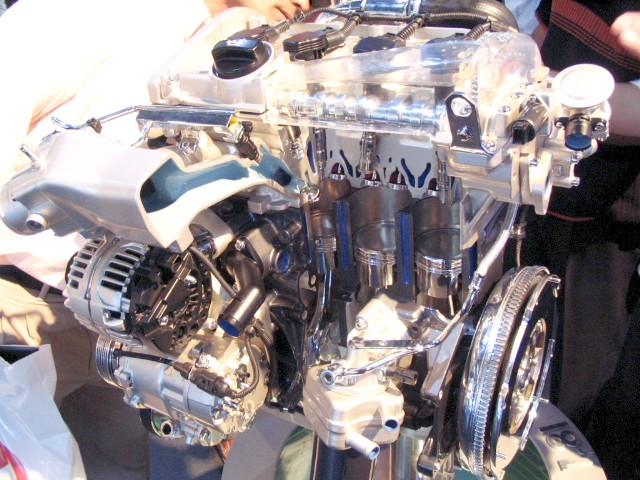 Motor 1.8L 20V Turbo - Fabricante VW/AUDI